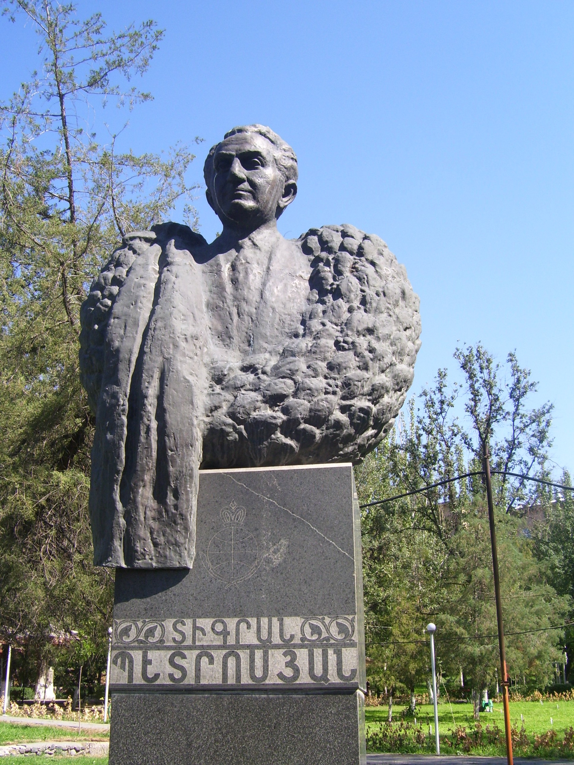 Հուշարձան Տիգրան Պետրոսյանի 1989 թ.Շախմատիստի տան մոտ 6/151.1